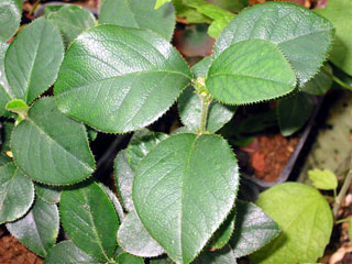 Feuilles de Pseudocydonia sinensis